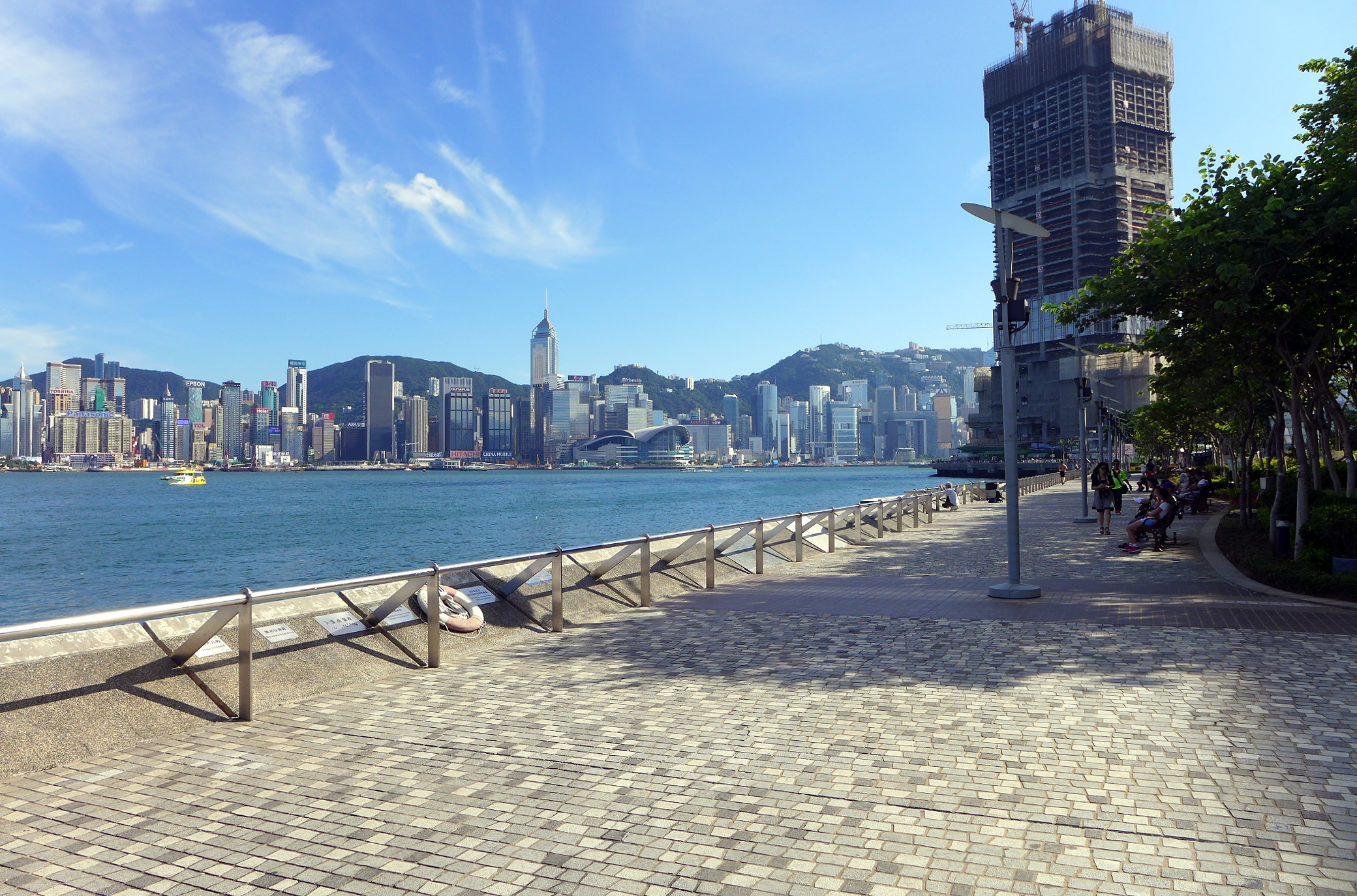 Tsim Sha Tsui Promenade